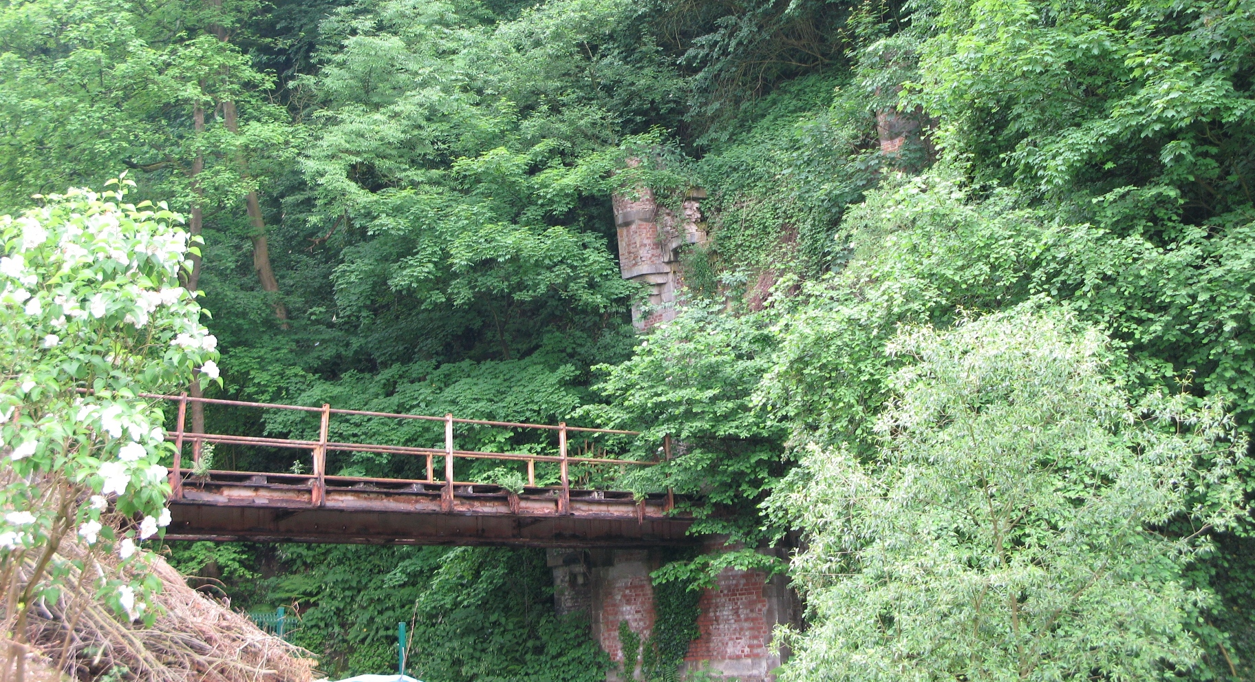 Dat zougewuessent Nordportal vum Tunnel mat der Bréck iwwer d'Berwinne (Mee 2008). Kategorie:Tunnellen an der Belsch